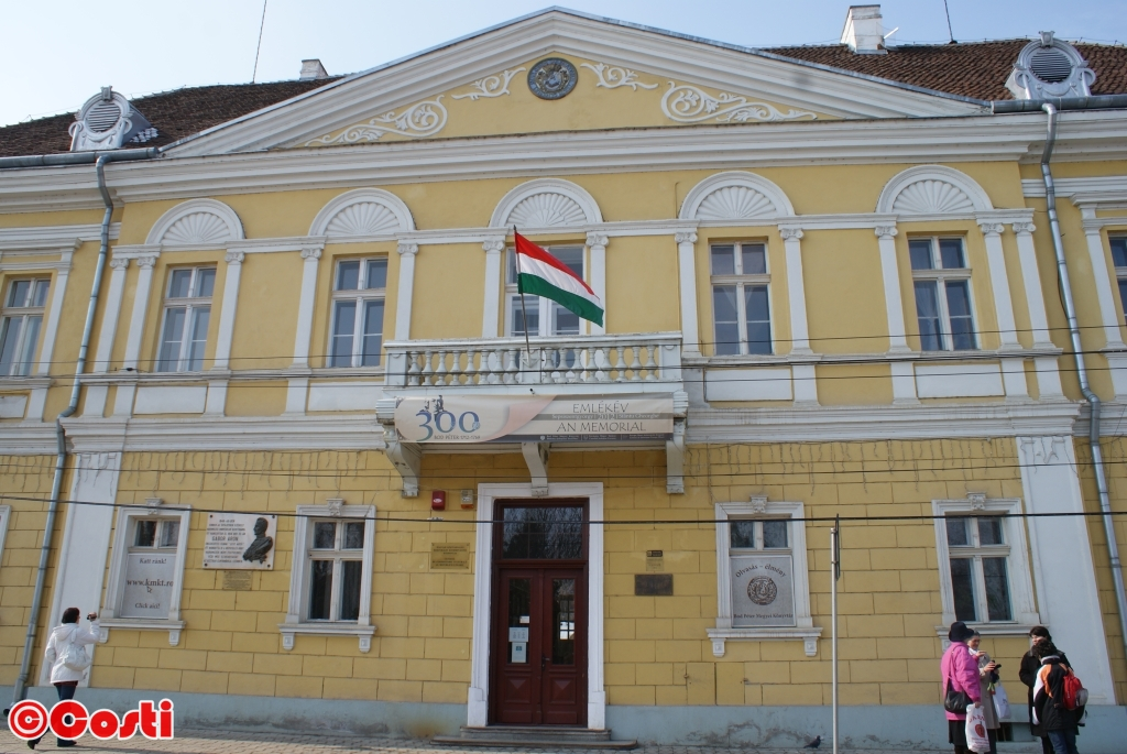 Fostul Sediu al Scaunelor, azi Biblioteca Județeană Covasna din Sfântu Gheorghe.